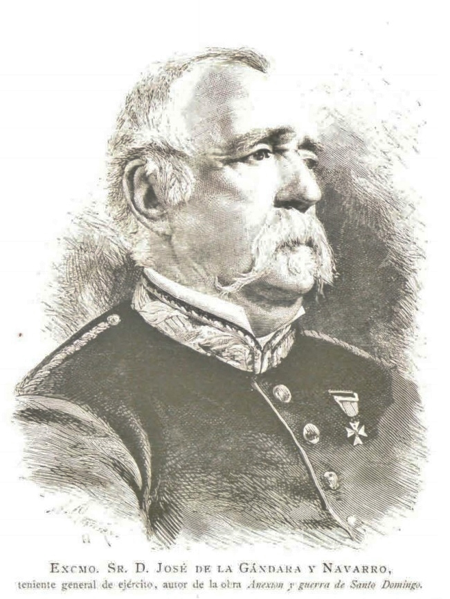 José de la Gándara y Navarro